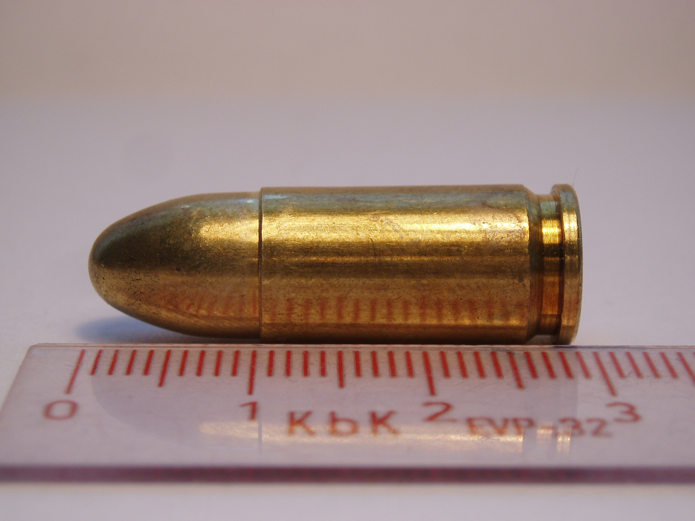 9 mm Luger pistol cartrdige. FMJ bullet. Manufacturer: Sellier & Bellot.